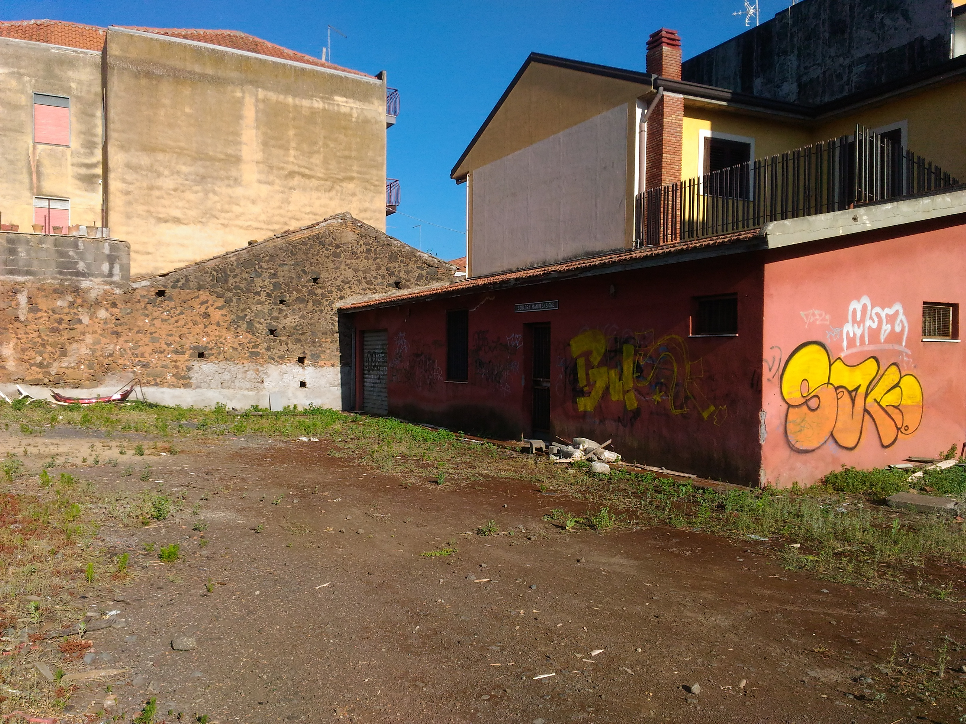 Edificio della squadra manutenzione annesso alla stazione di Misterbianco.